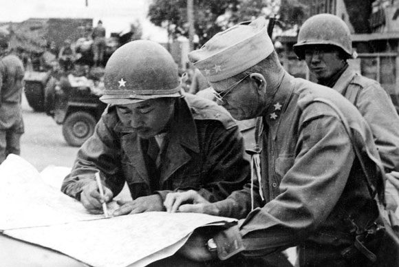 6.25 전쟁 중 작전수행중인 육군준장 백선엽 제1사단장